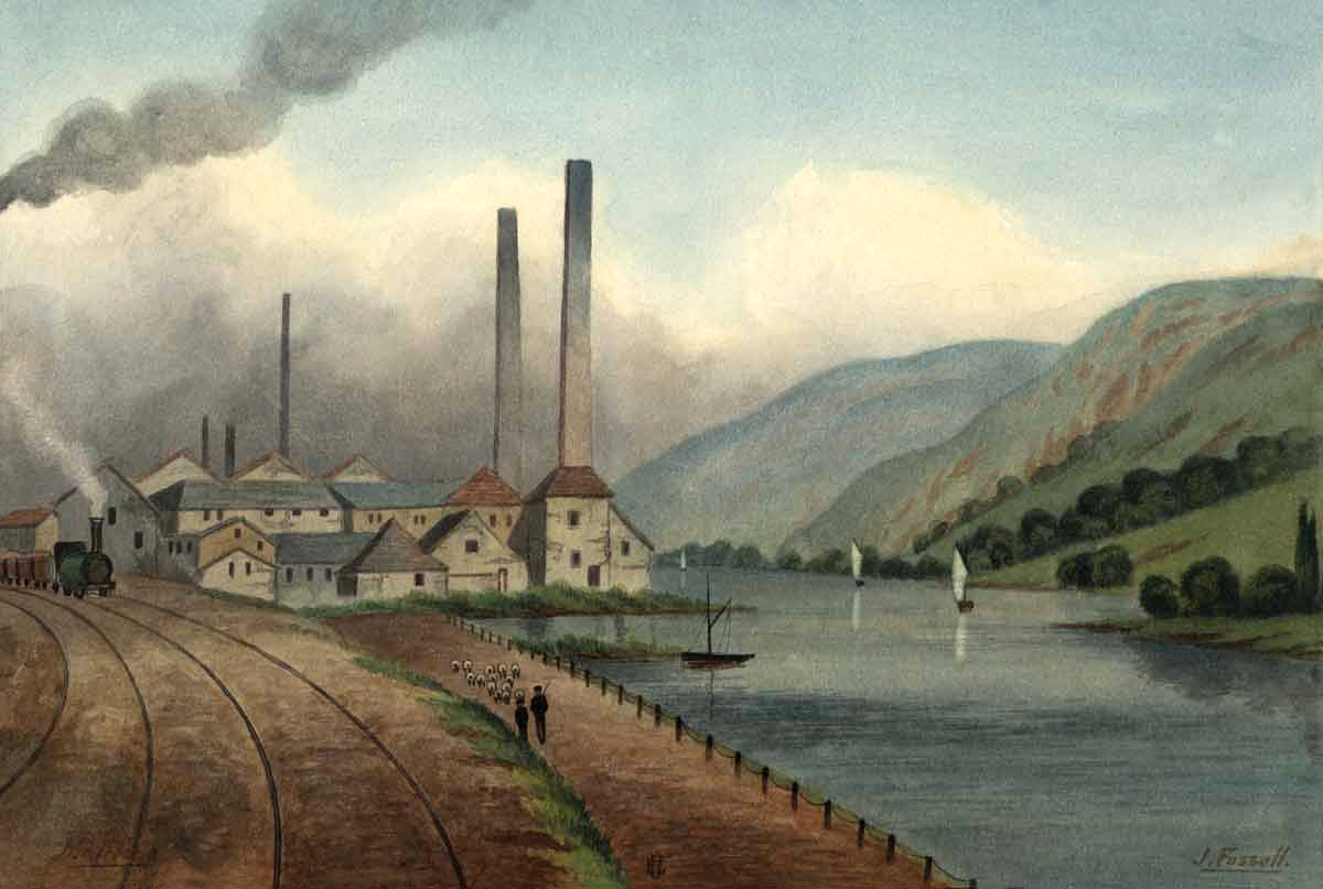 Les usines de la Vieille Montagne à la Mallieue (Saint-Georges-sur-Meuse)